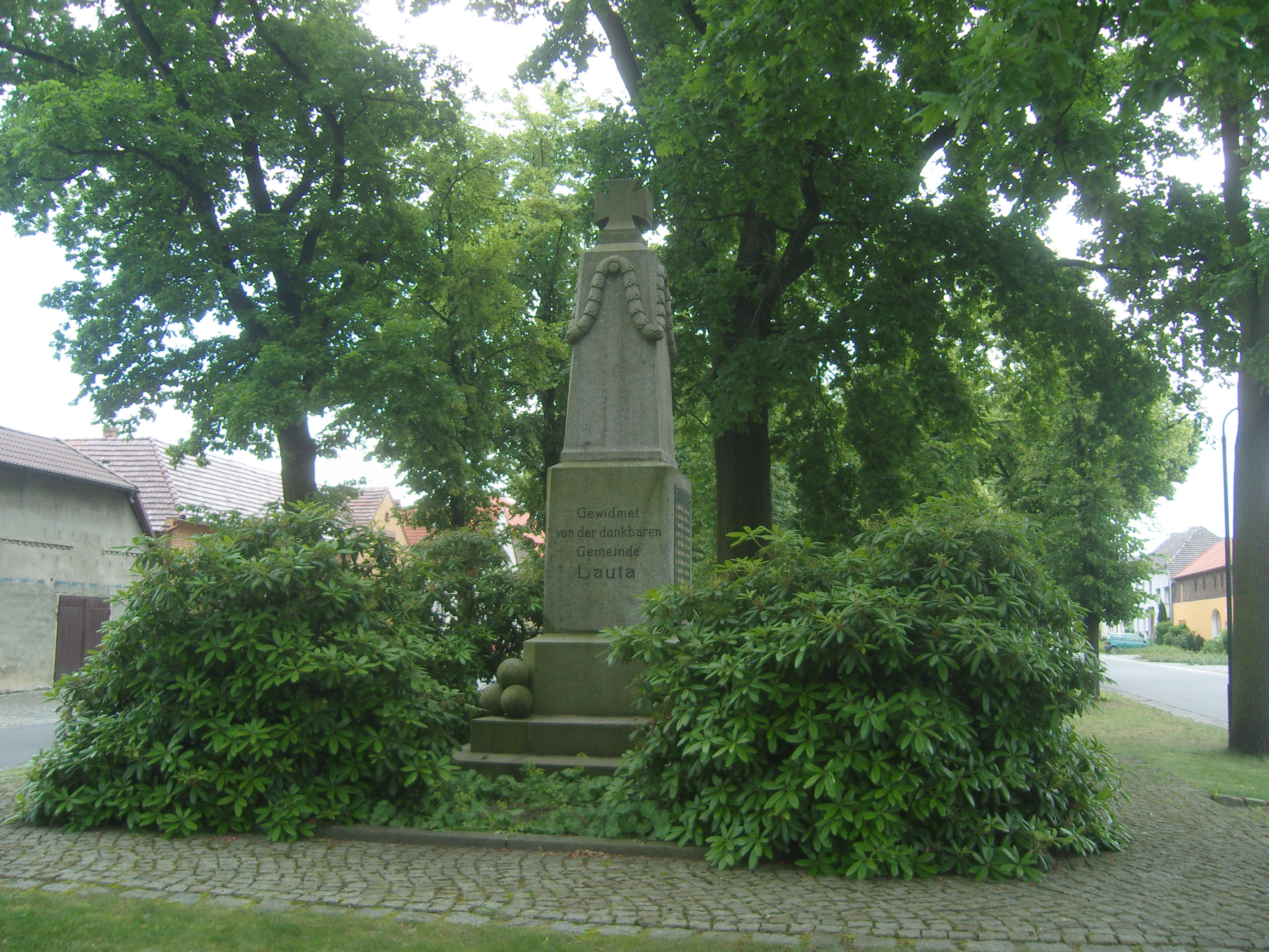 Kriegerdenkmal für die Gefallenen des Ersten Weltkriegs in Lauta auf dem Dorfanger